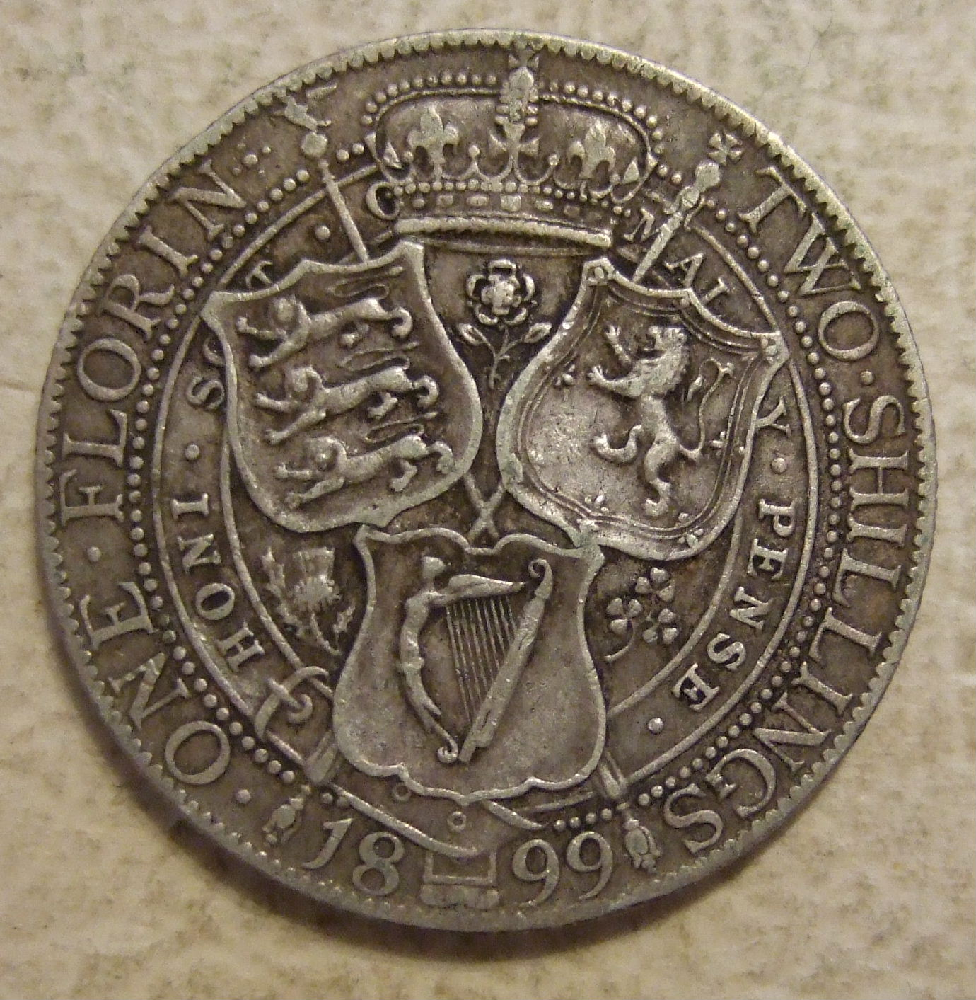 GREAT BRITAIN, VICTORIA 1899 ---FLORIN a